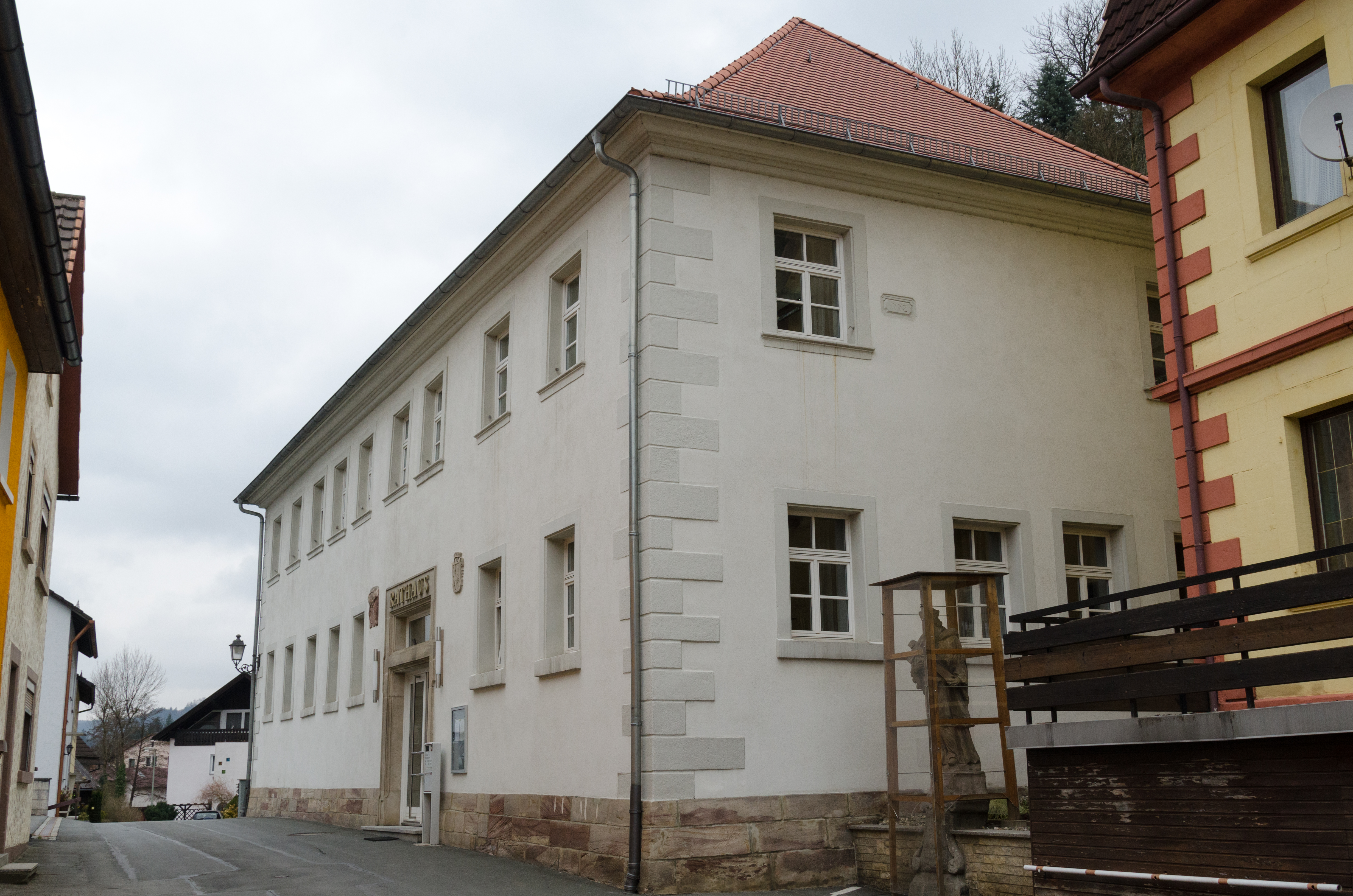 Wallenfels, Rathausgasse 1